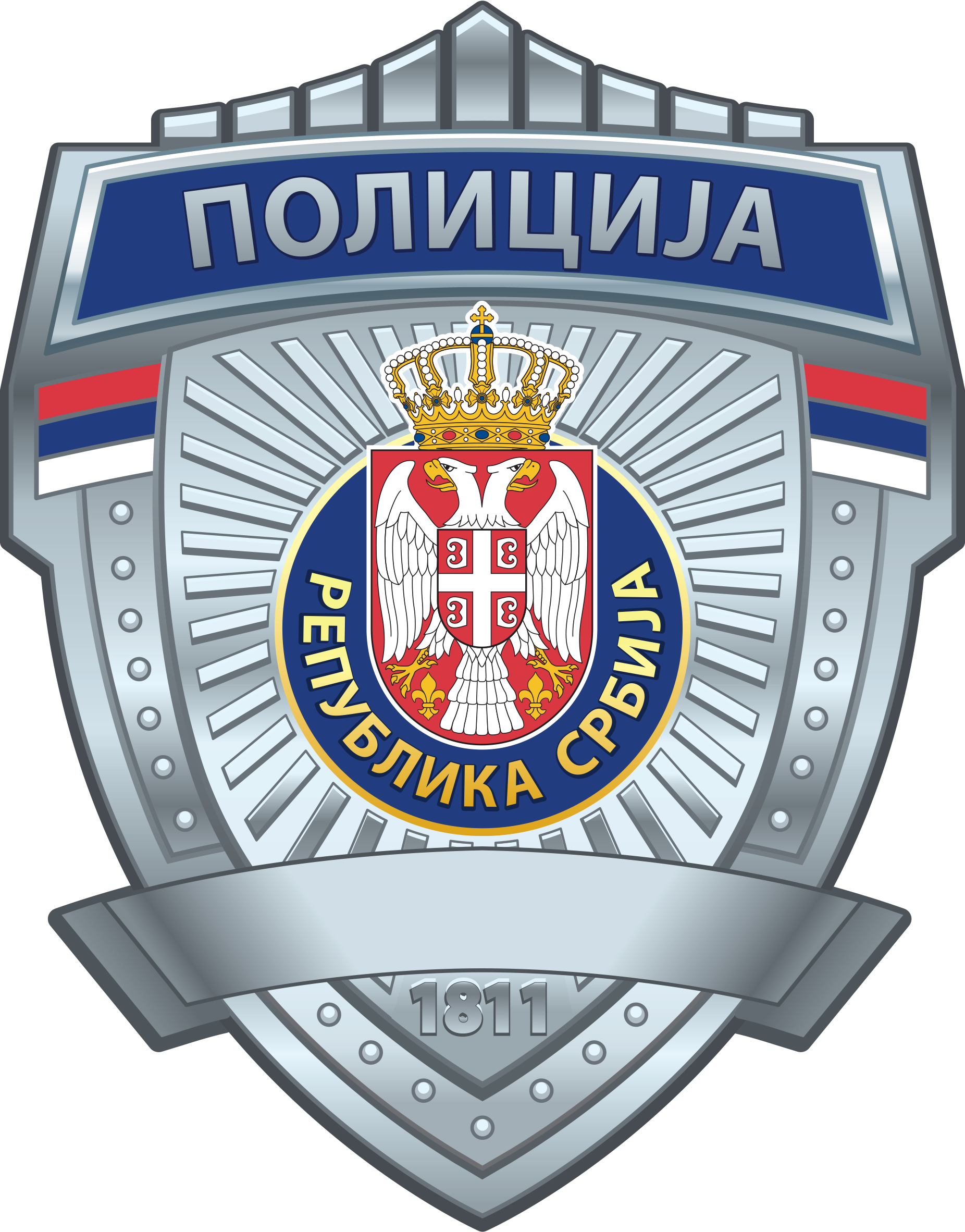 Значка Полиције Србије